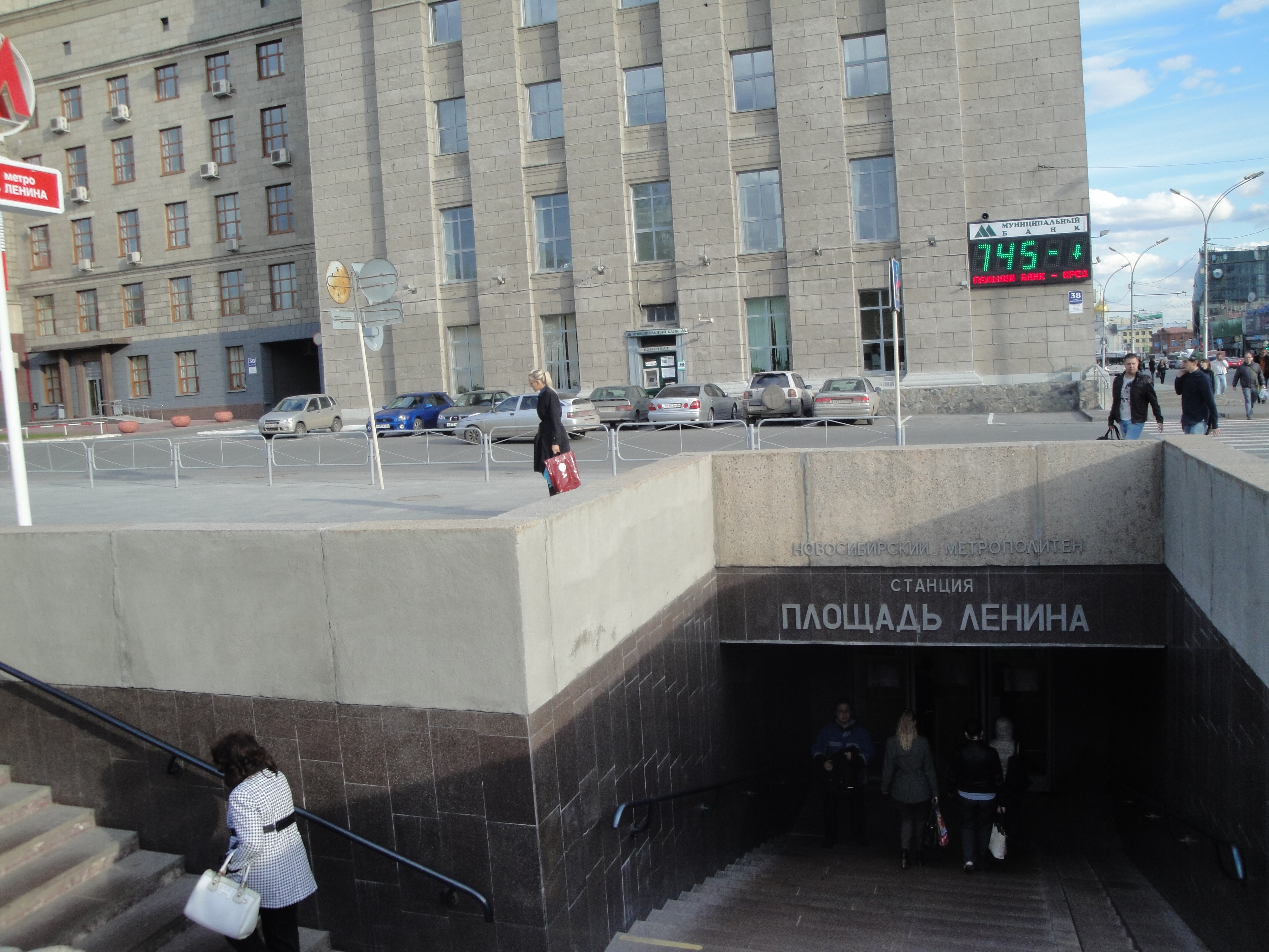 Станция метро «Площадь Ленина» (Новосибирск). Лестничный спуск, со стороны мэрии.